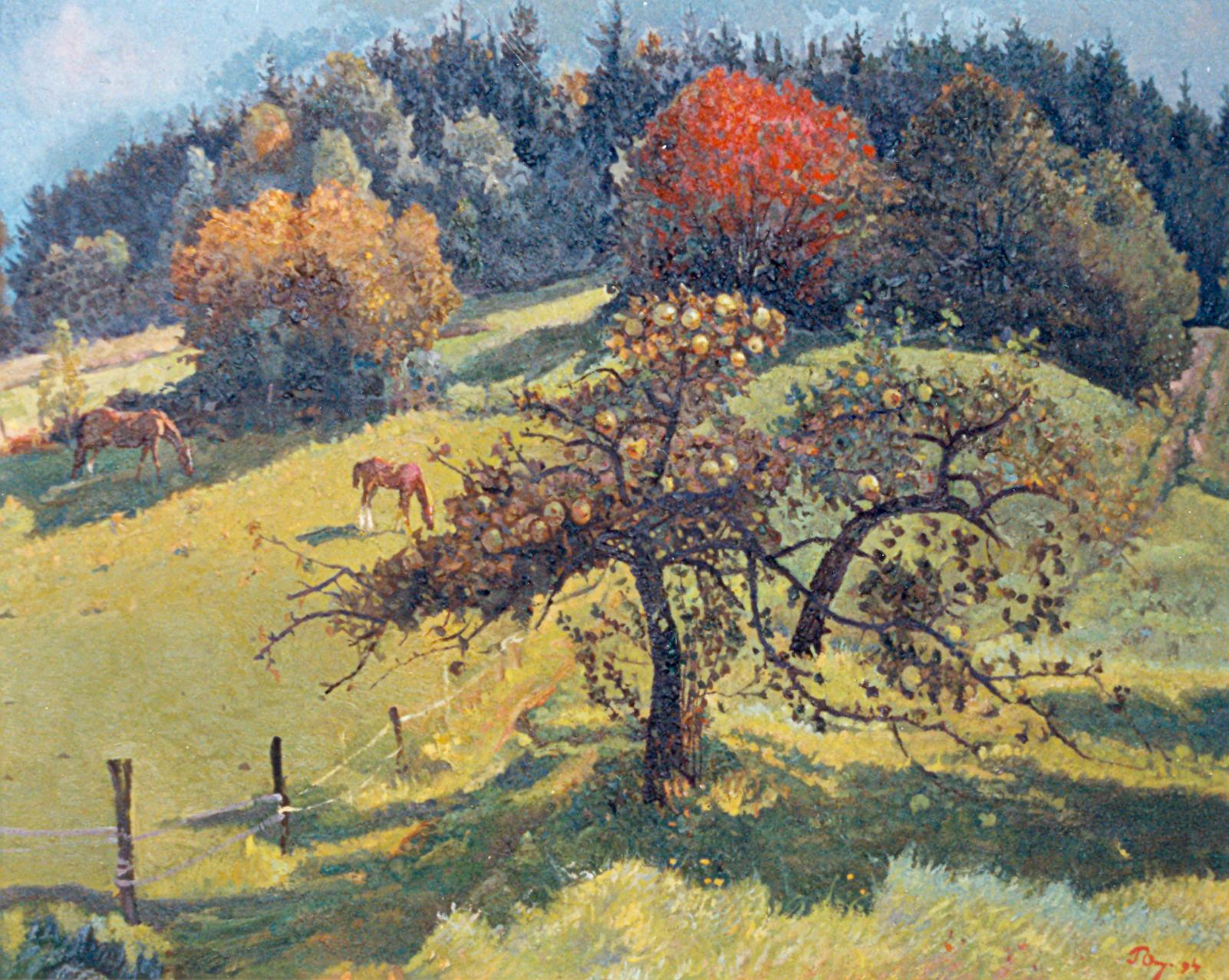 Лошади и яблоня осенью, 1994.